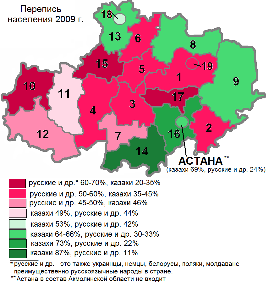 Доля казахов, русских и др. по районам Акмолинской области по переписи населения 2009 года